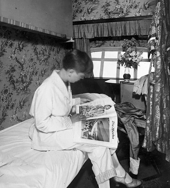 Wie die Passagiere des "Graf Zeppelin" auf der Weltreise wohnen! Das Schlaf-Cupé an Bord des "Graf Zeppelin".